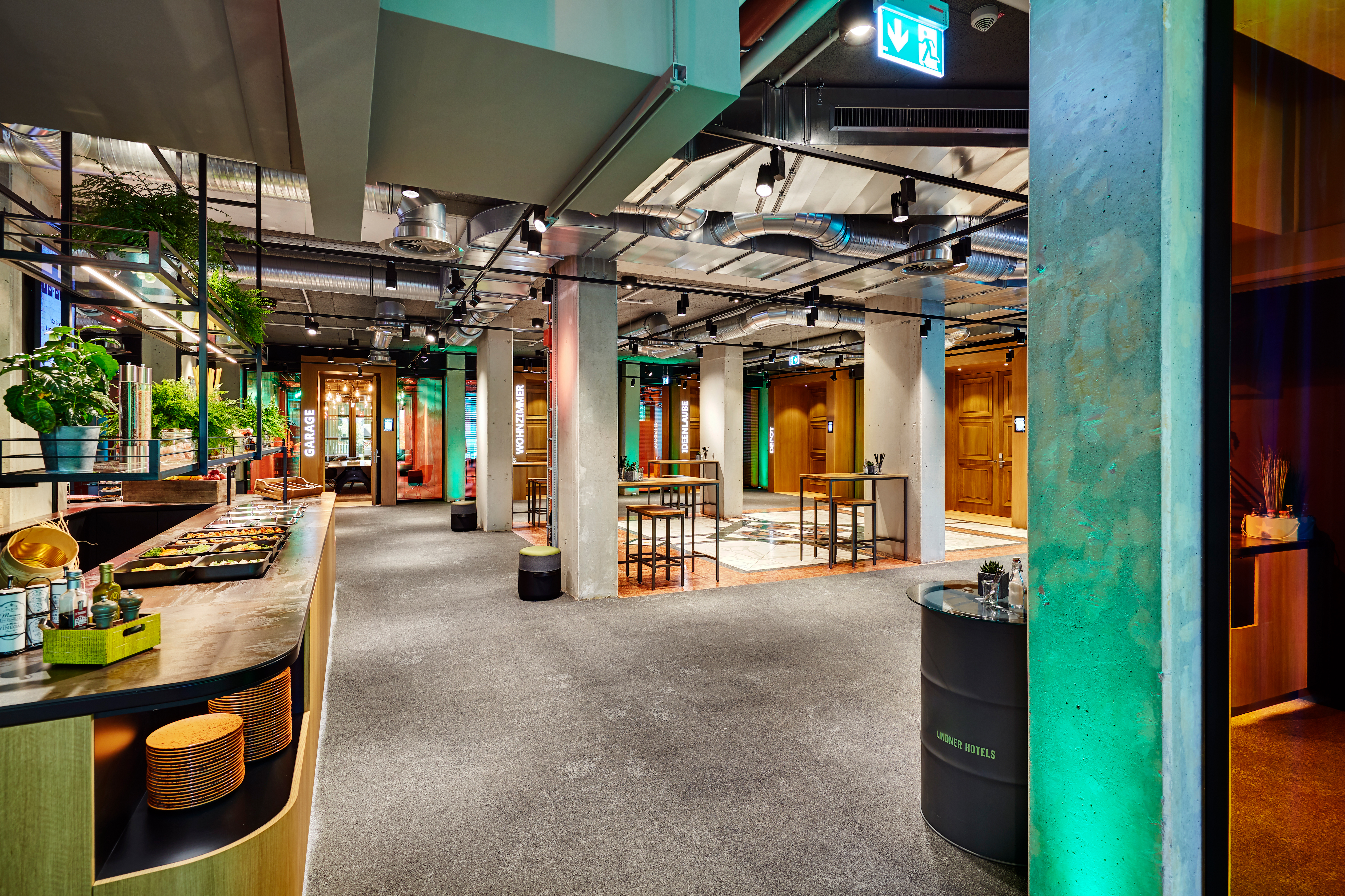 Tagungsbereich "Denkquartier" im Lindner Congress Hotel, Düsseldorf